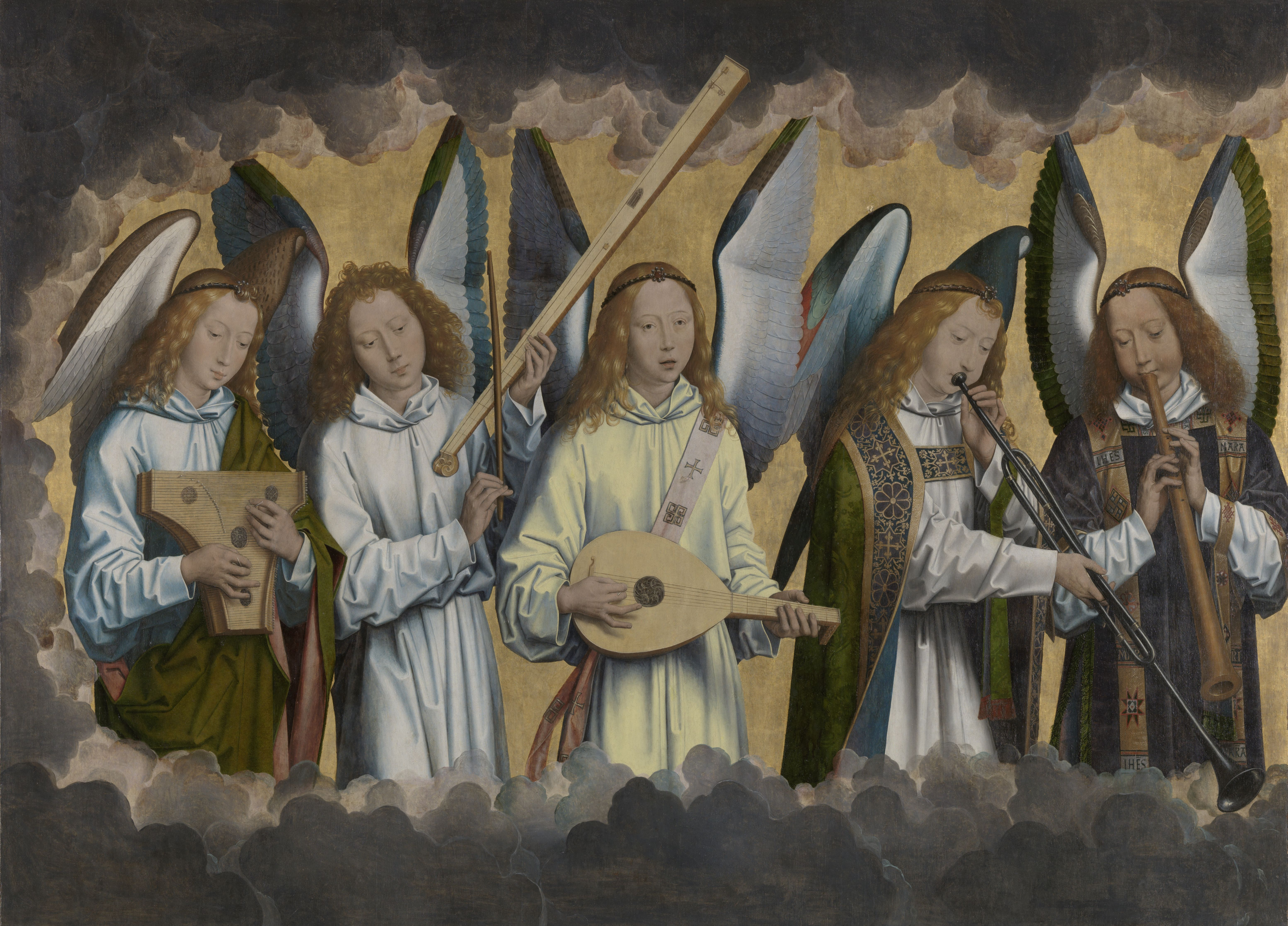 schilderij ( Hans Memling( koninklijk museum voor schone kunsten antwerpen